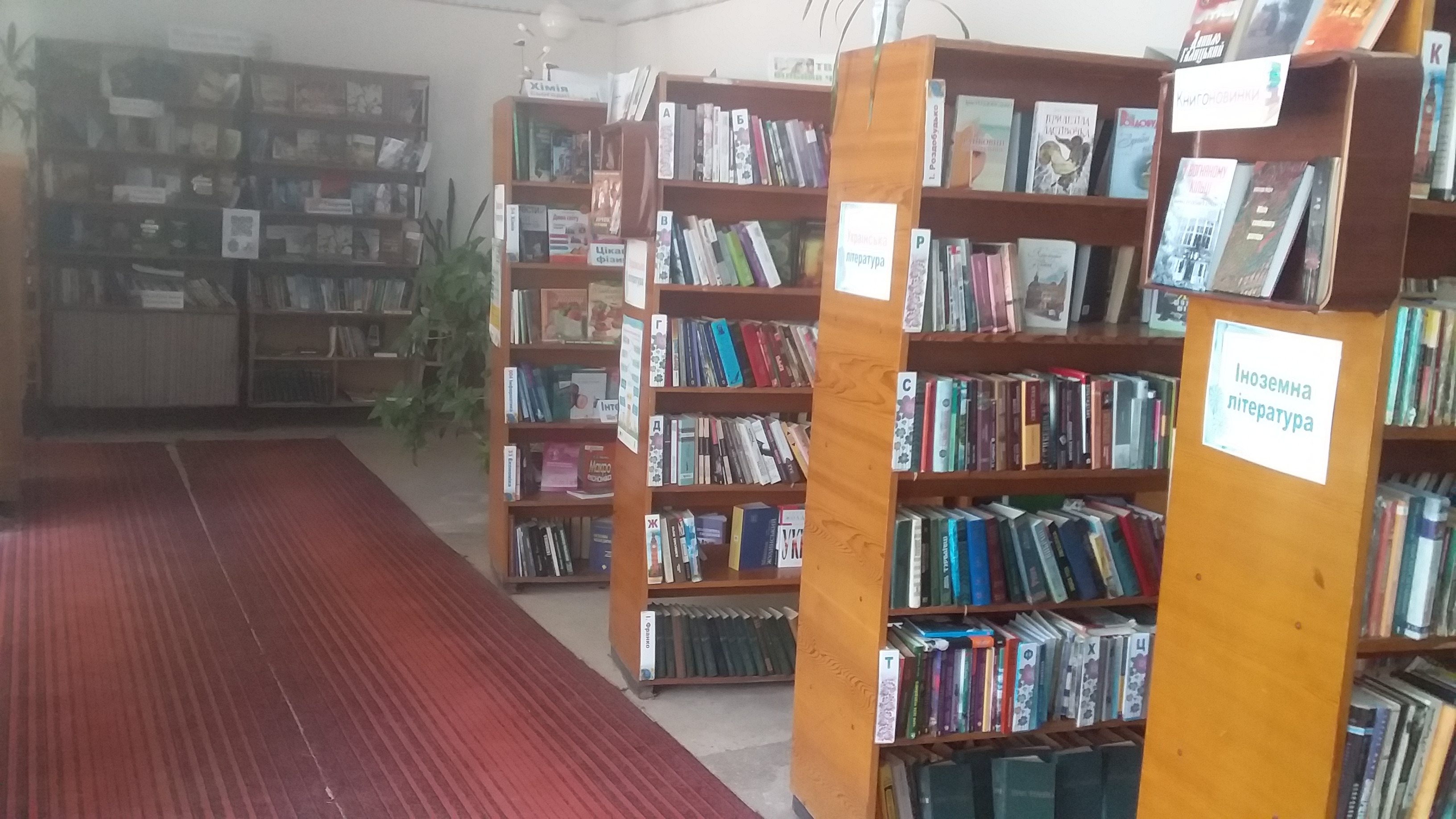 Абонемент і читальний зал бібліотеки-філії №9